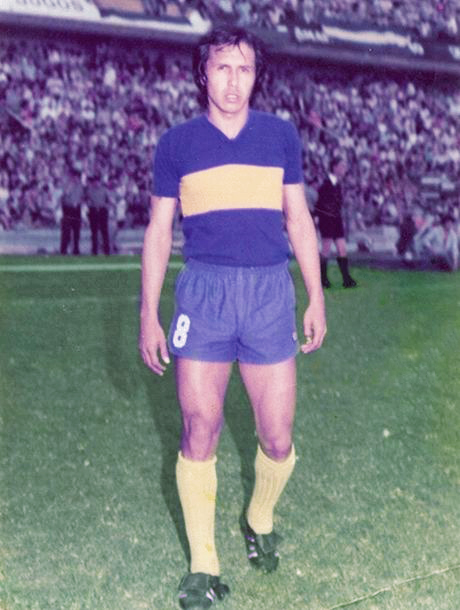 Ο Χουαν Ραμόν Ρότσα με τα χρώματα της Μπόκα Τζούνιορς